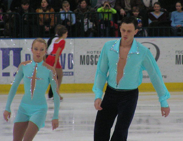 Tatiana Totmianina und Maxim Marinin während der Russischen Meisterschaften 2005